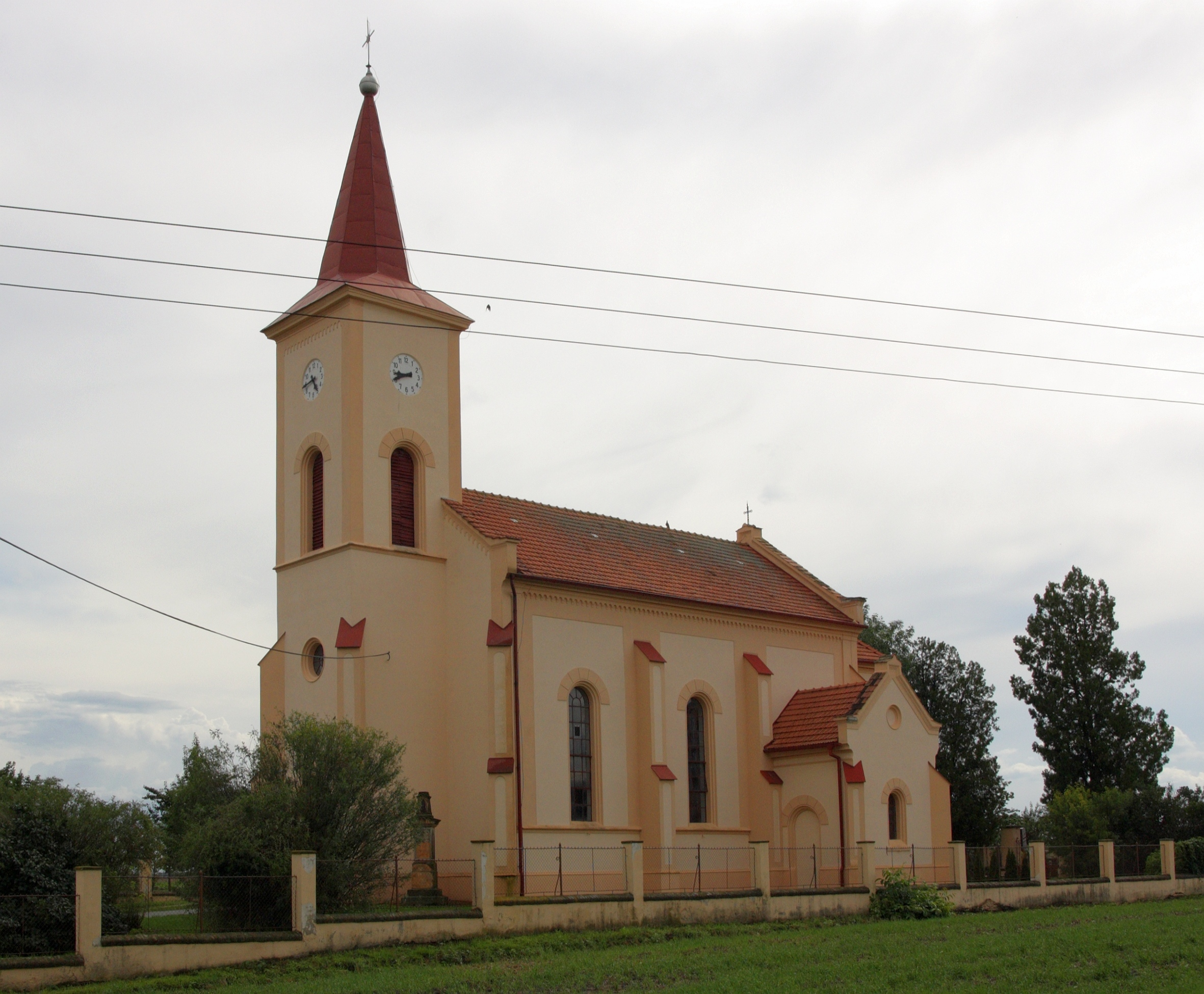 Odrovice - Kostel Panny Marie Pomocnice křesťanů.